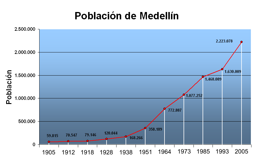 Grafica del crecimiento de la población de Medellín, Colombia.